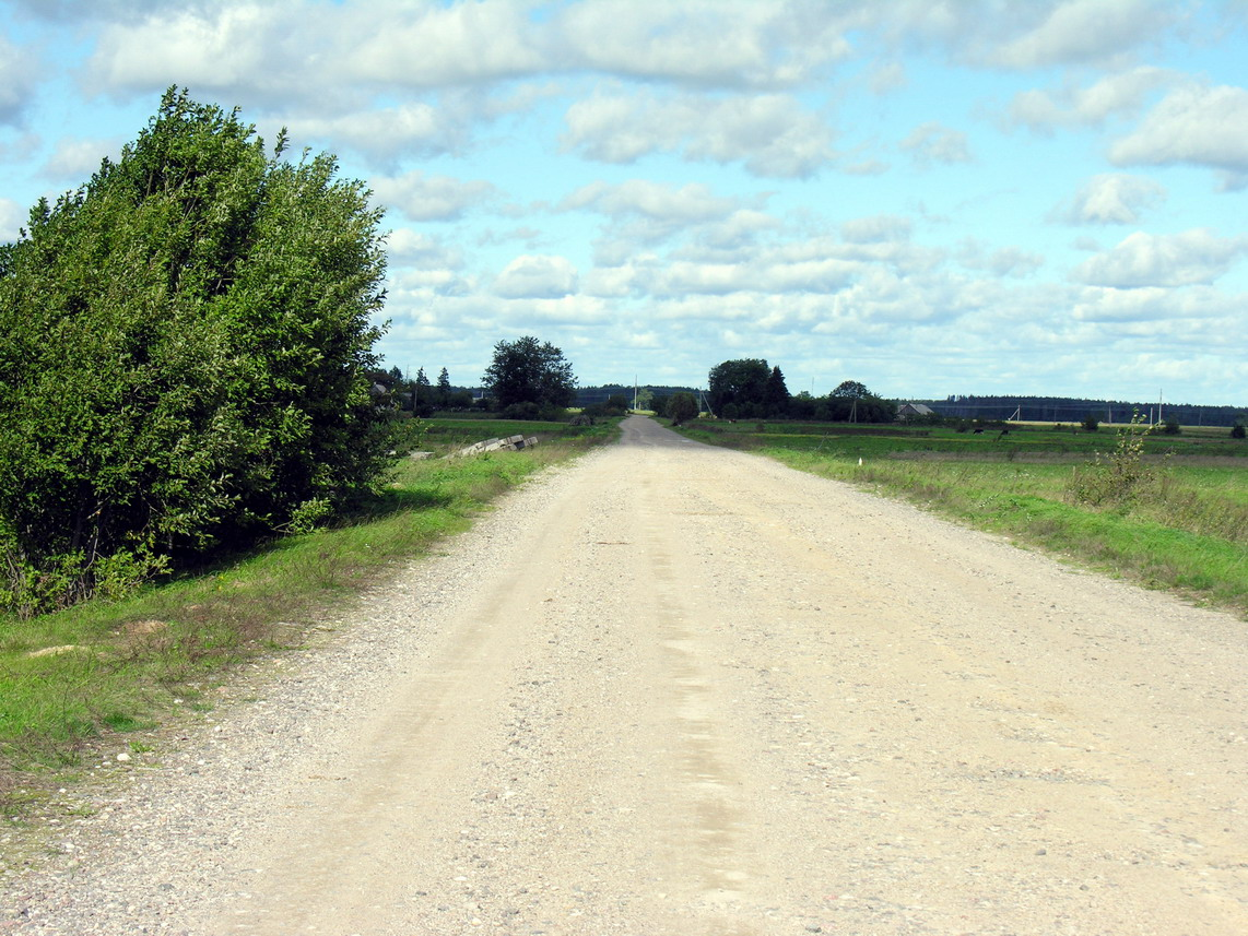 Liūliškiai Mažeikių raj., Židikų seniūnija Vieškelis per Liūliškių kaimą Foto: Algirdas, 2006 m. rugsėjo 9 d., Lietuva